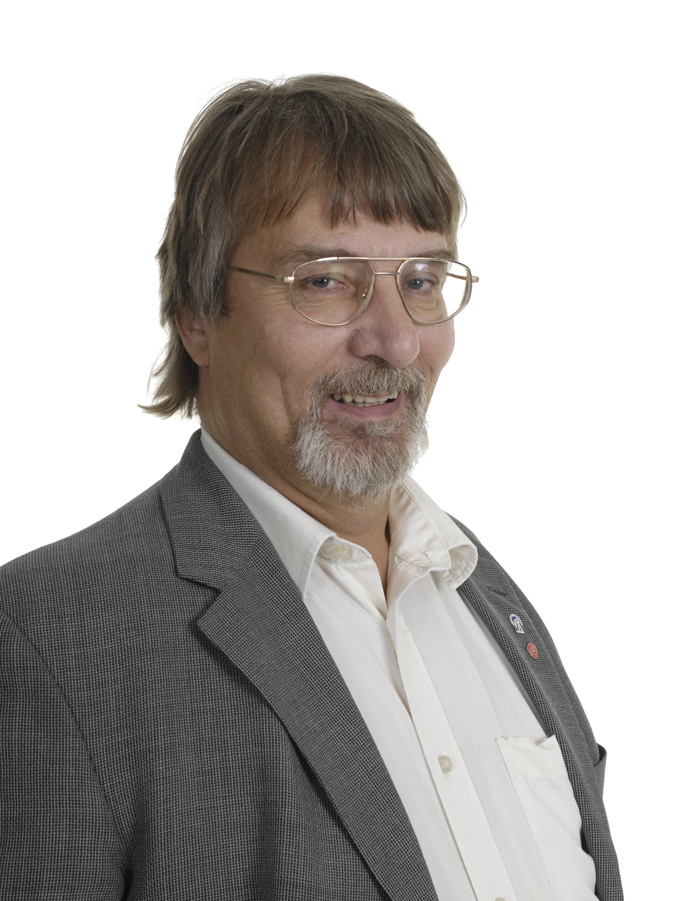 Knut Werner Hansen